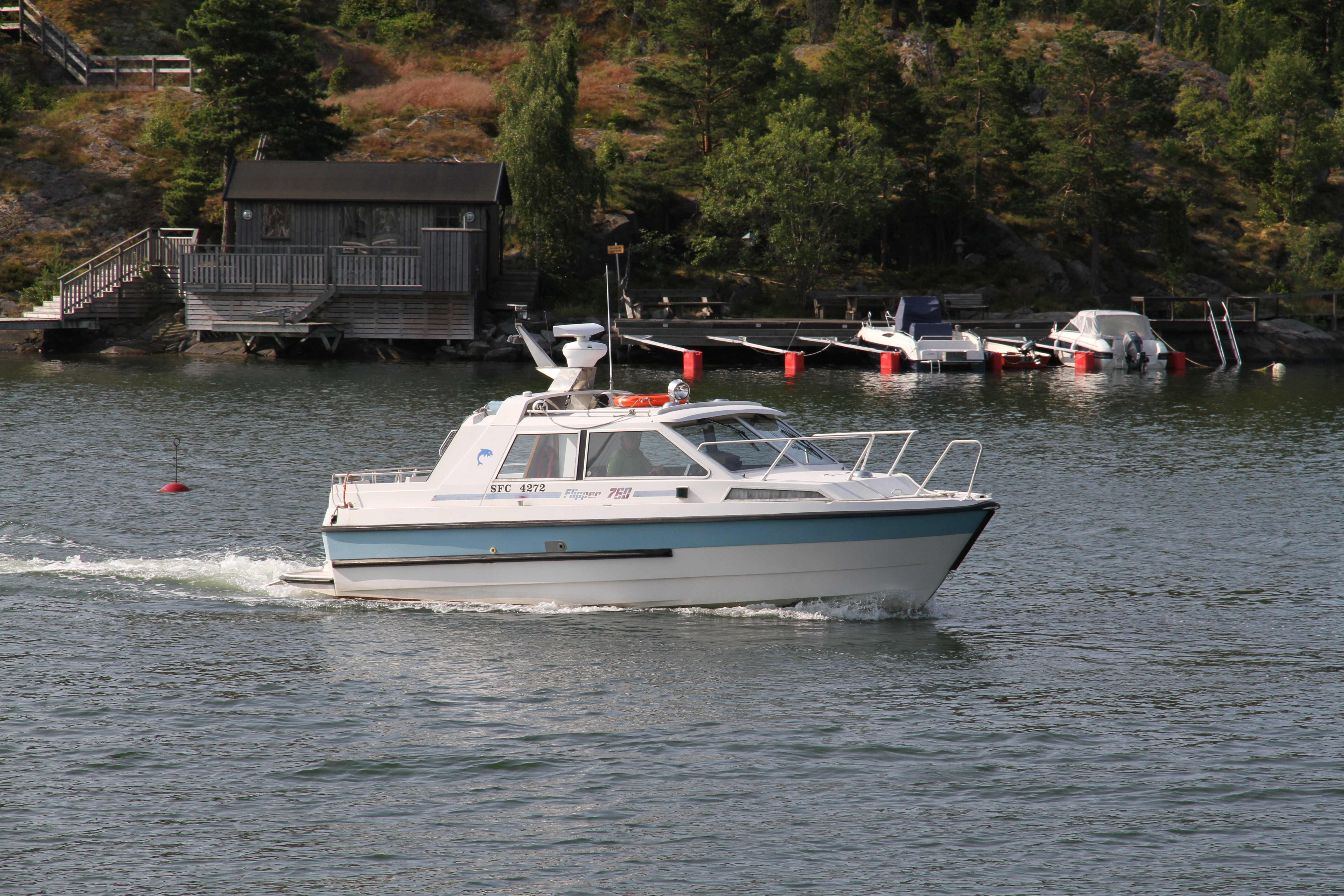 Flipper 760 i Arkösund 9 juli 2013